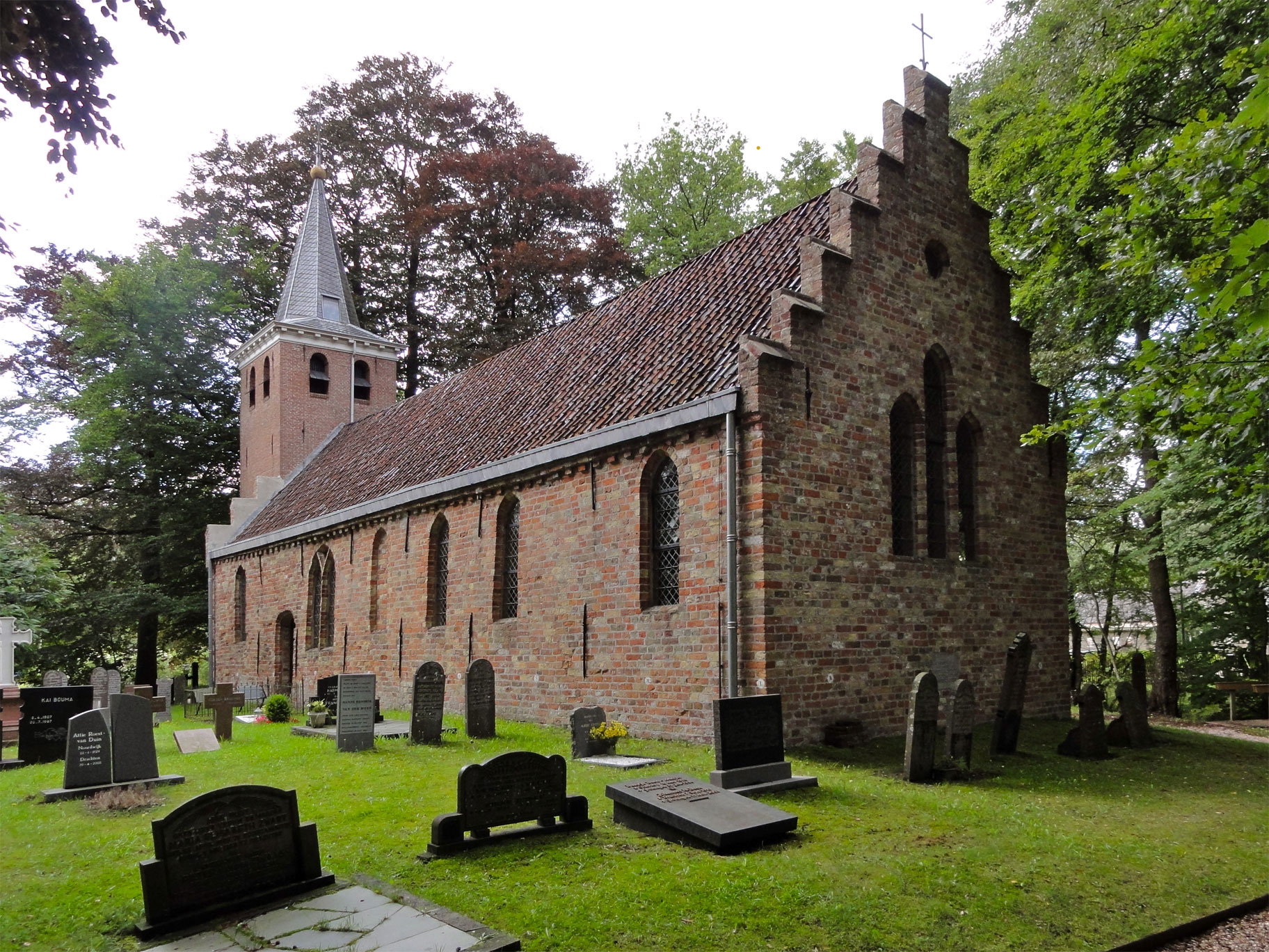 Hippolytuskerk in Olterterp